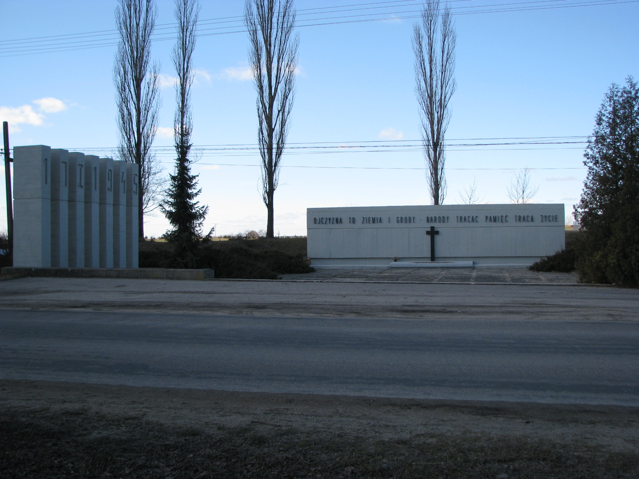 mauzoleum na Kalkówce upamiętniające ofiary mordu dokonanego przez Niemców na ludności Mławy i więźniach tutejszego obozu